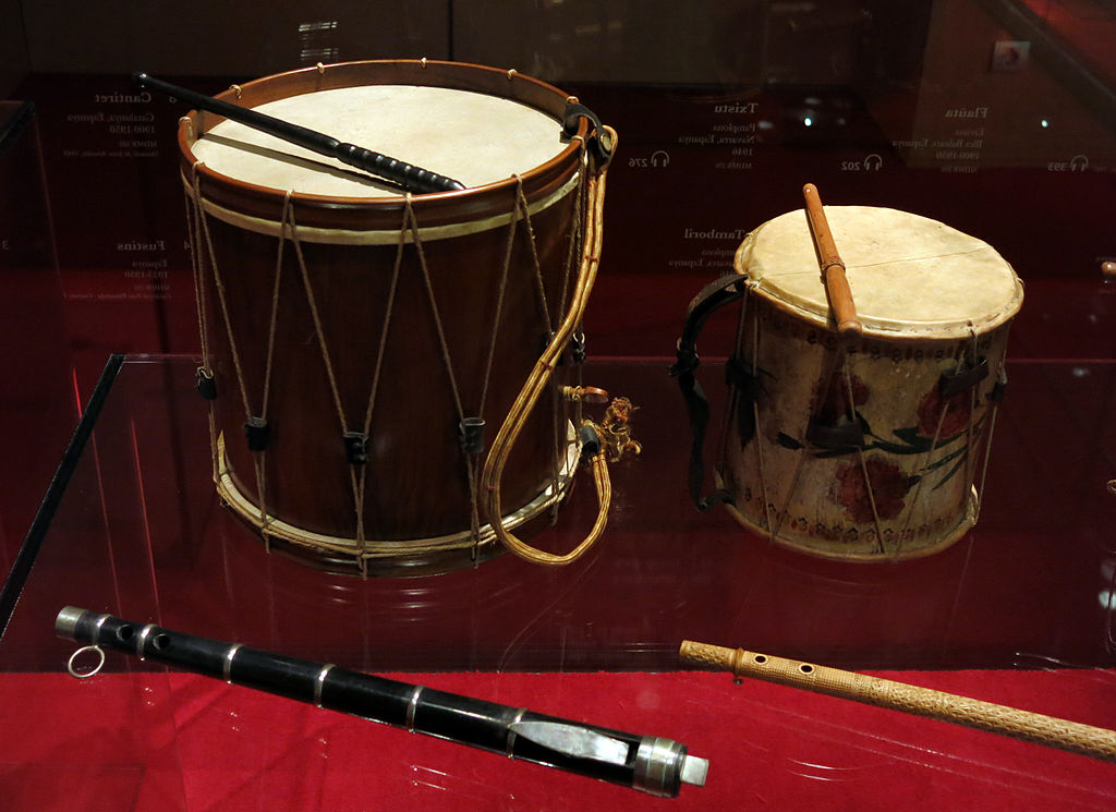 2017, XII Hernaniko Txistulari gazteen Txapelketa, taldeann2